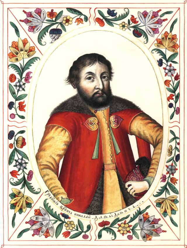 Грузинский царевич Николай Давыдович (Ираклий I)